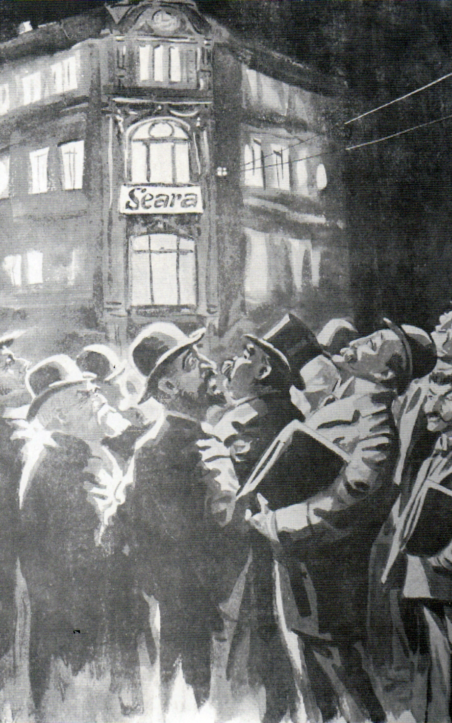 Așteptând apariția ziarului Seara. Caricatură din Albumul meu.